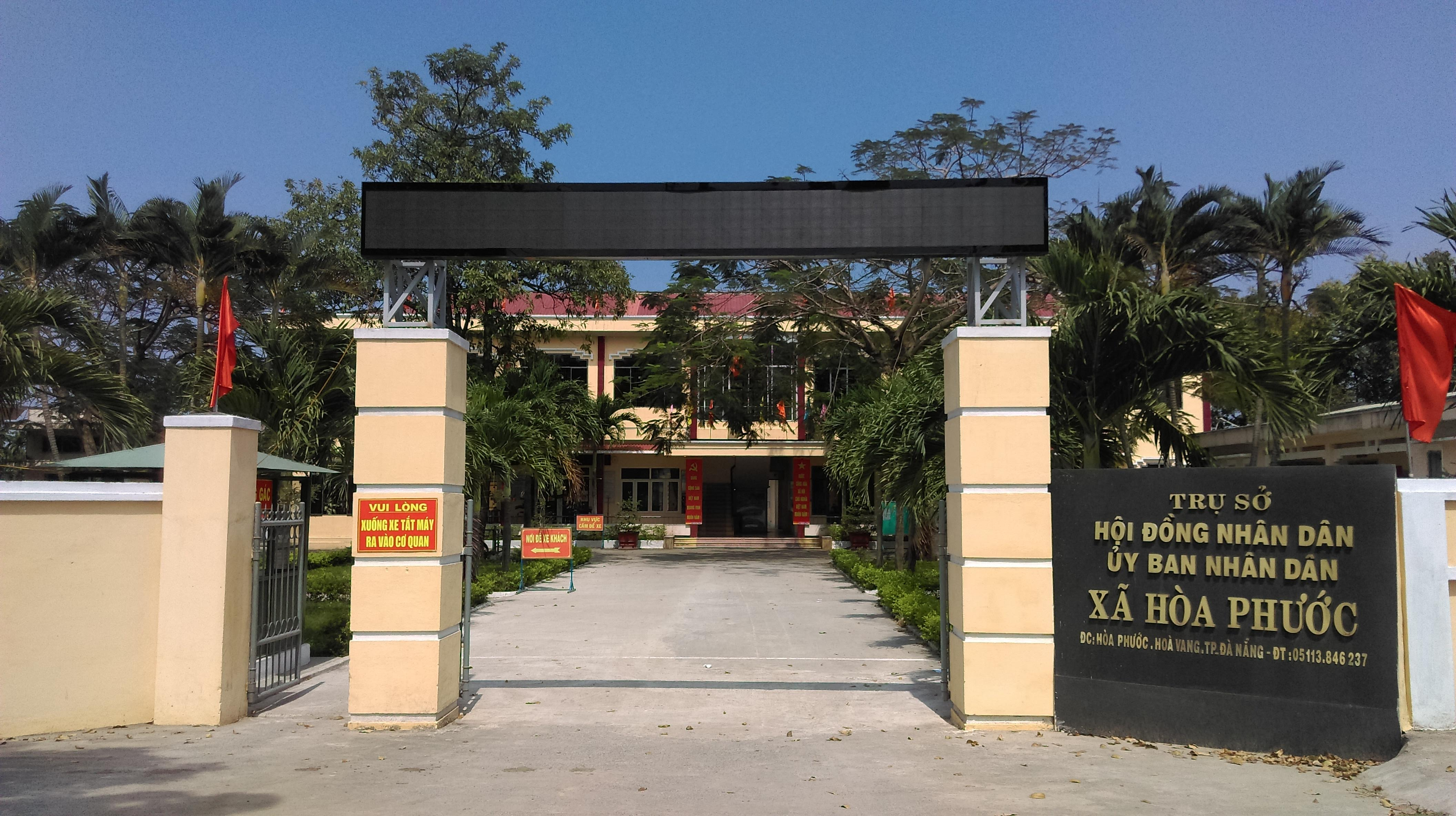 UBND xã Hòa Phước, Hòa Vang, Đà Nẵng